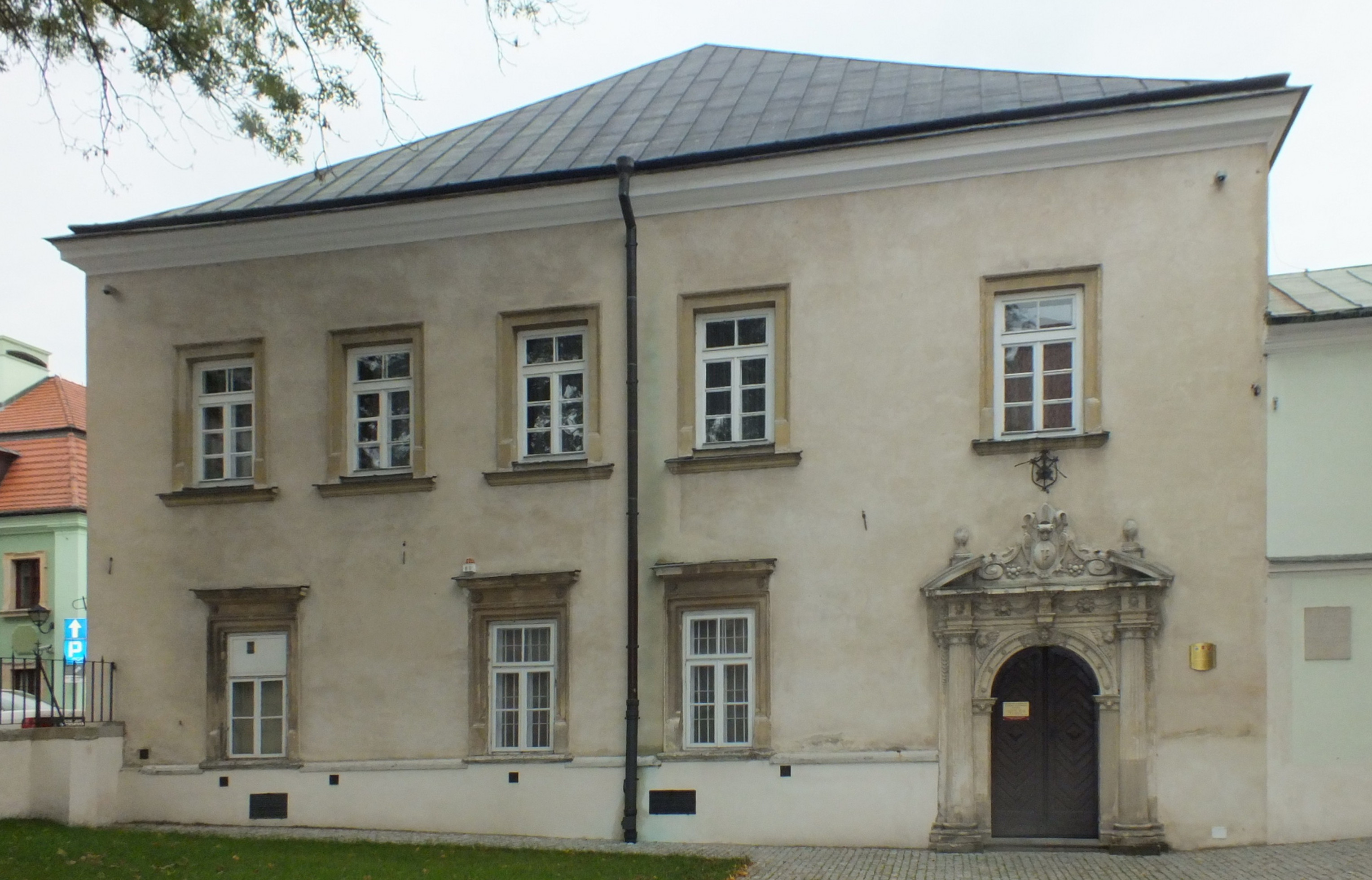 Zamość, dziekania Infułatka, kon. XVI, XIX/XX